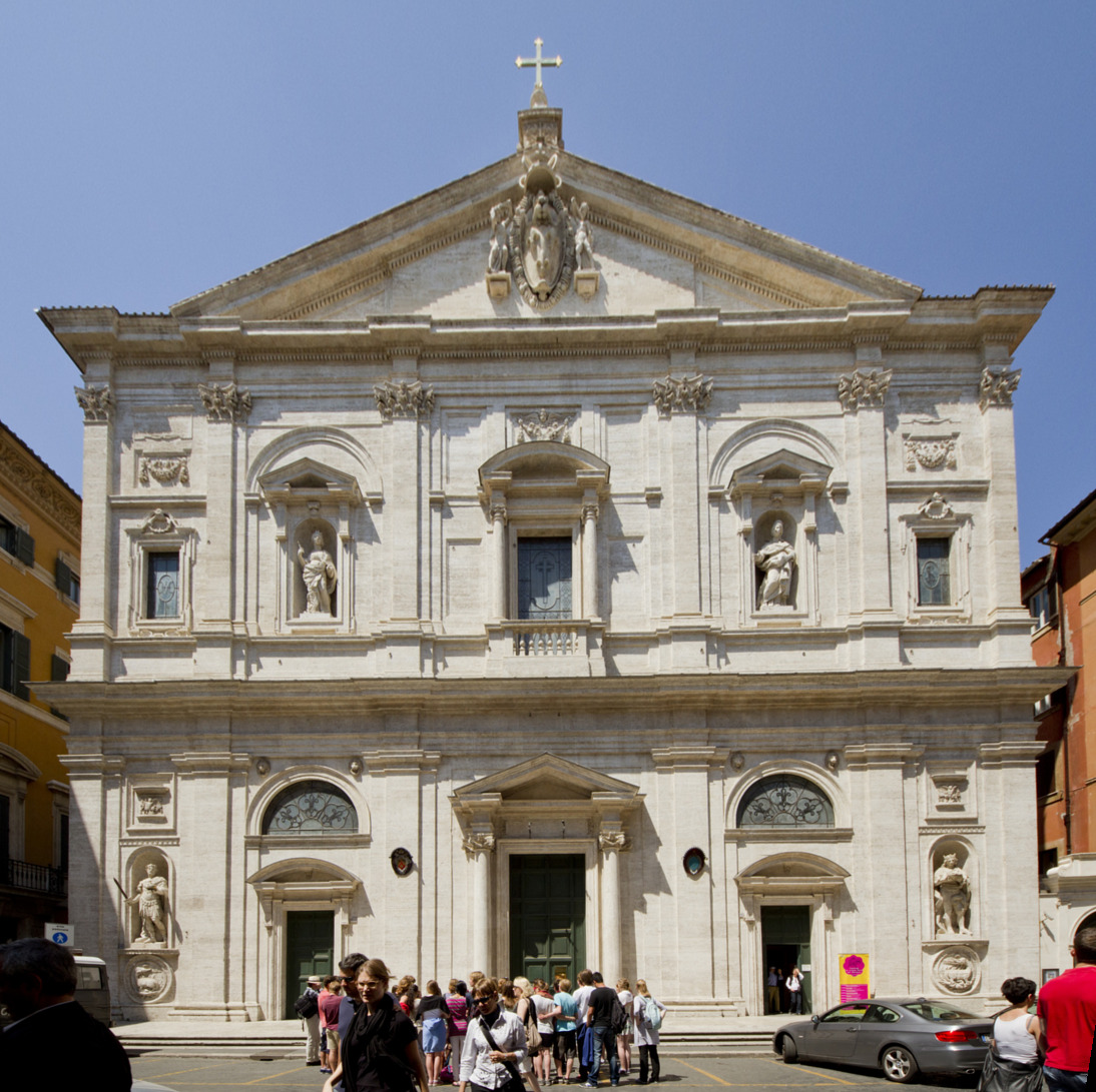 San Luigi dei Francesi Church